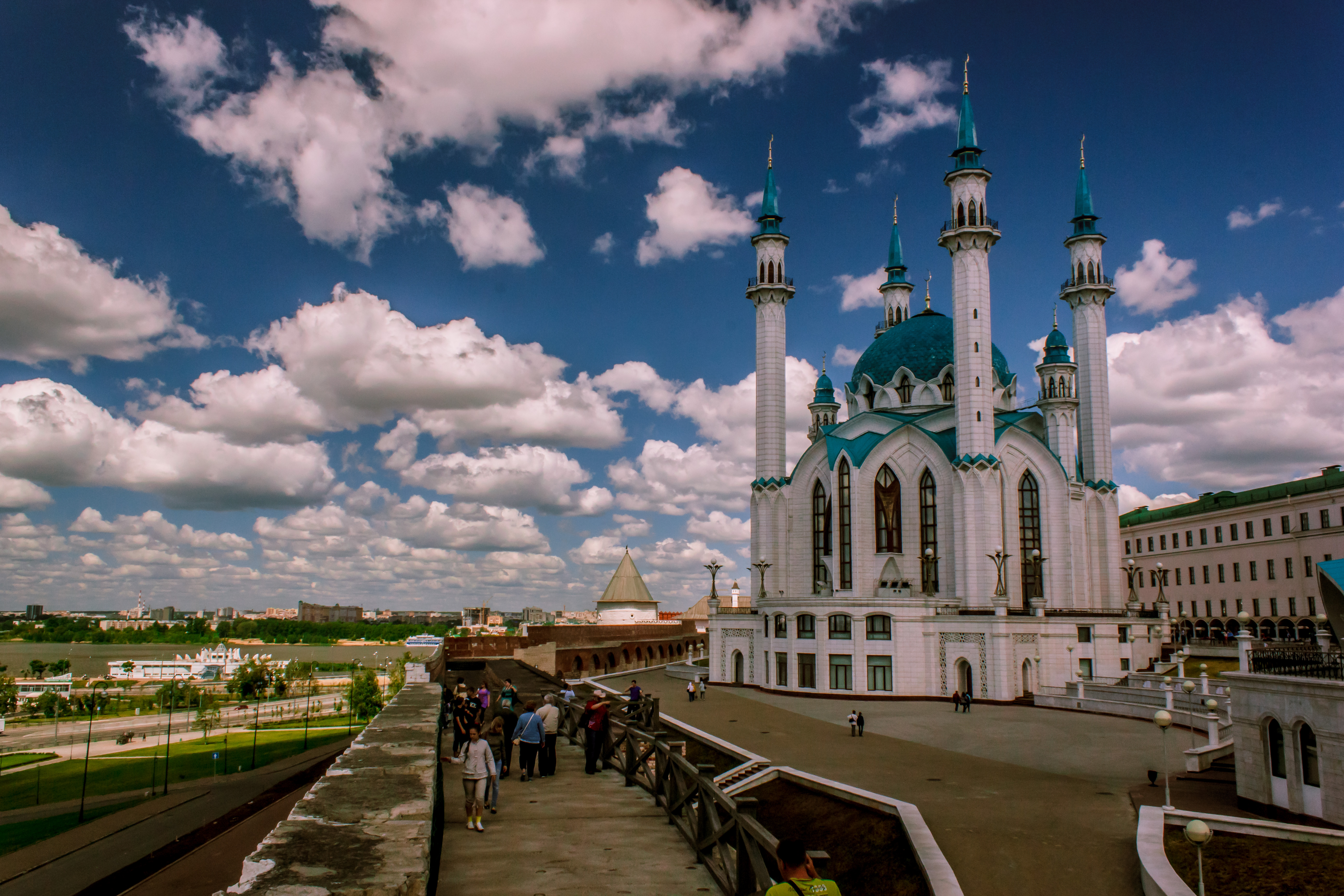 Башня Безымянная: Кремль, Казань, Татарстан